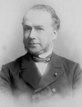 E N Rahusen, lid Eerste Kamer